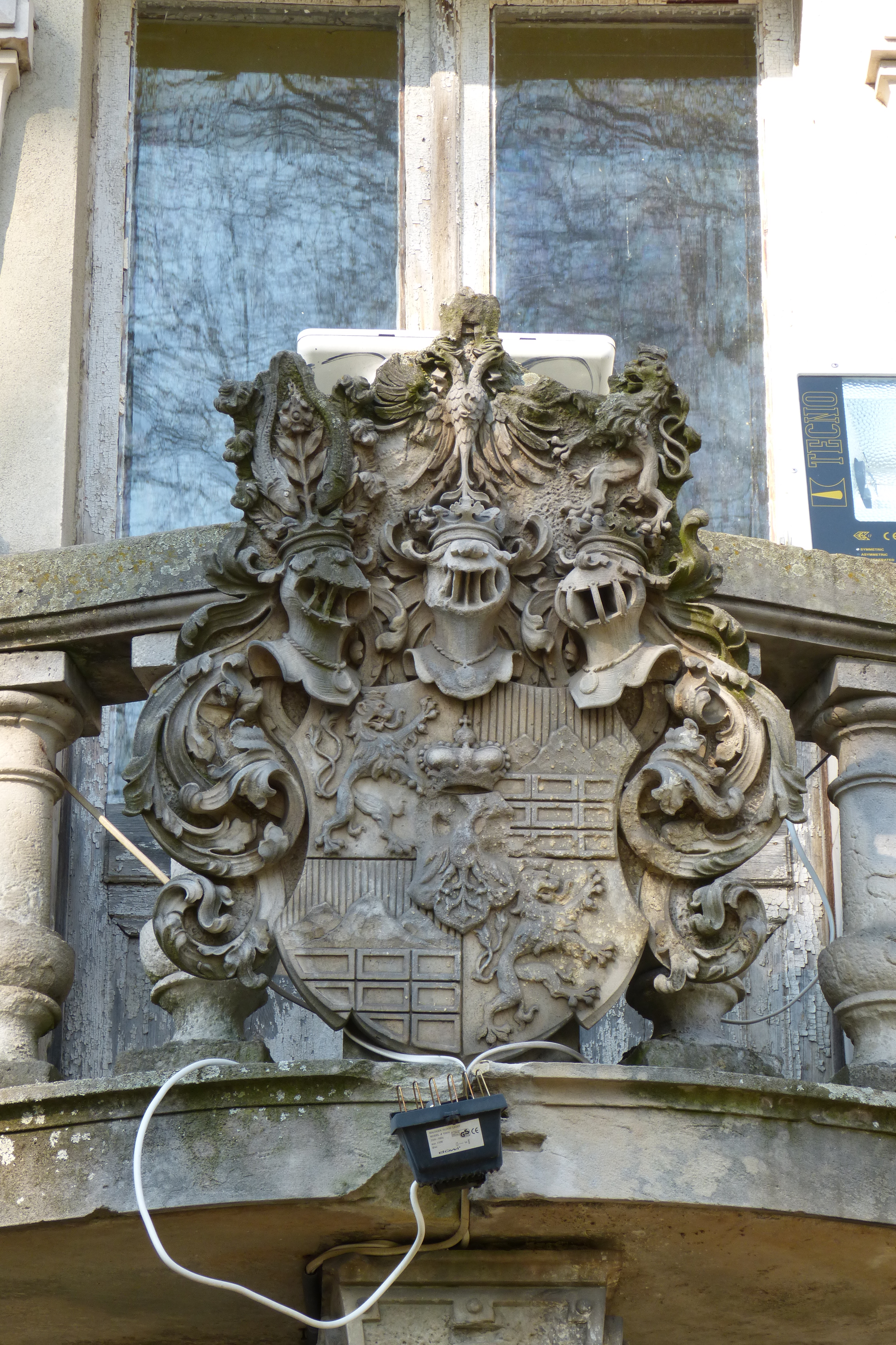 Kartusz herbowy nad wejściem do zamku w Dąbrowie Niemodlińskiej